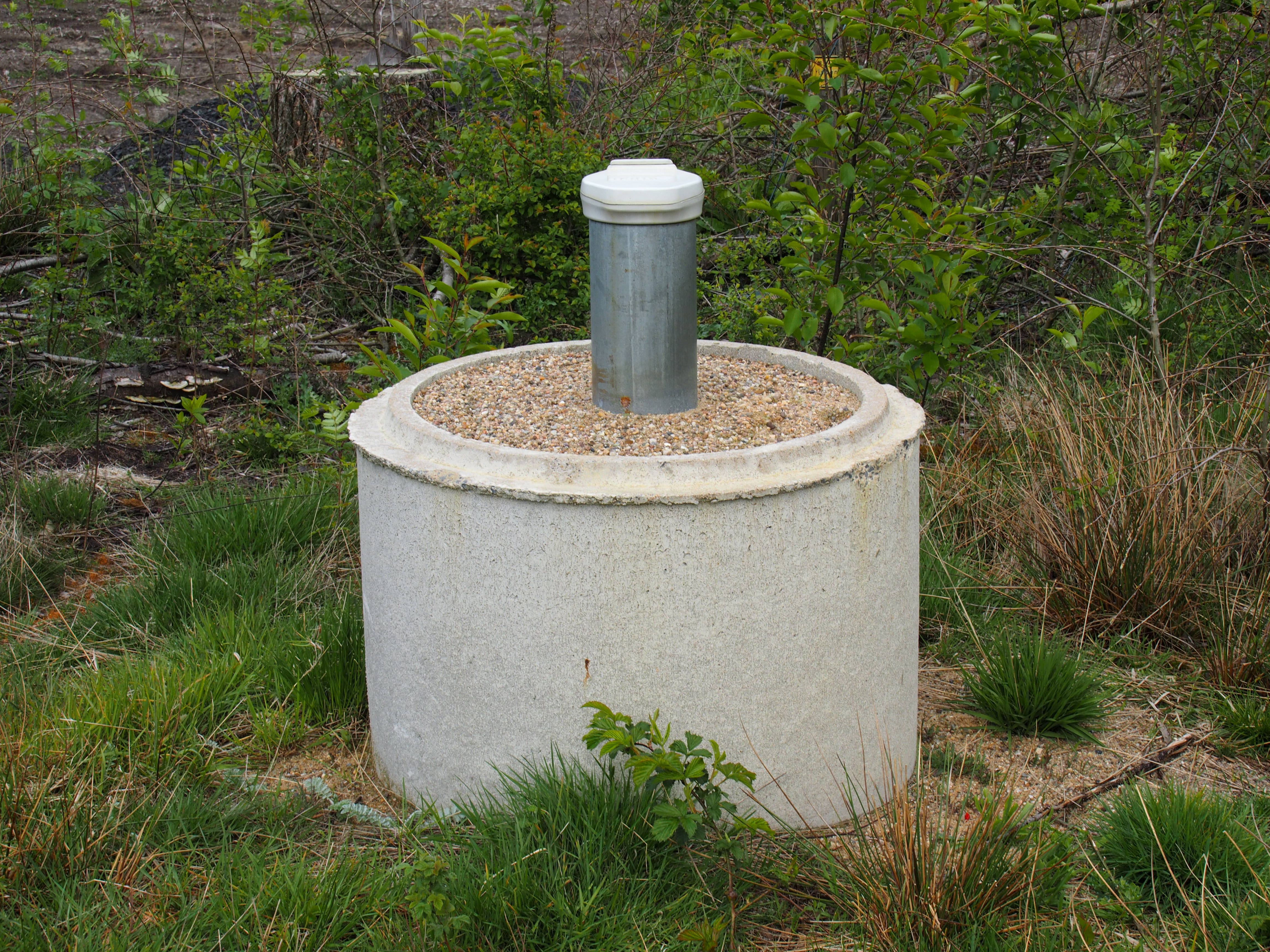 100 mm Messstelle im Außenbereich des Dethlinger Teiches